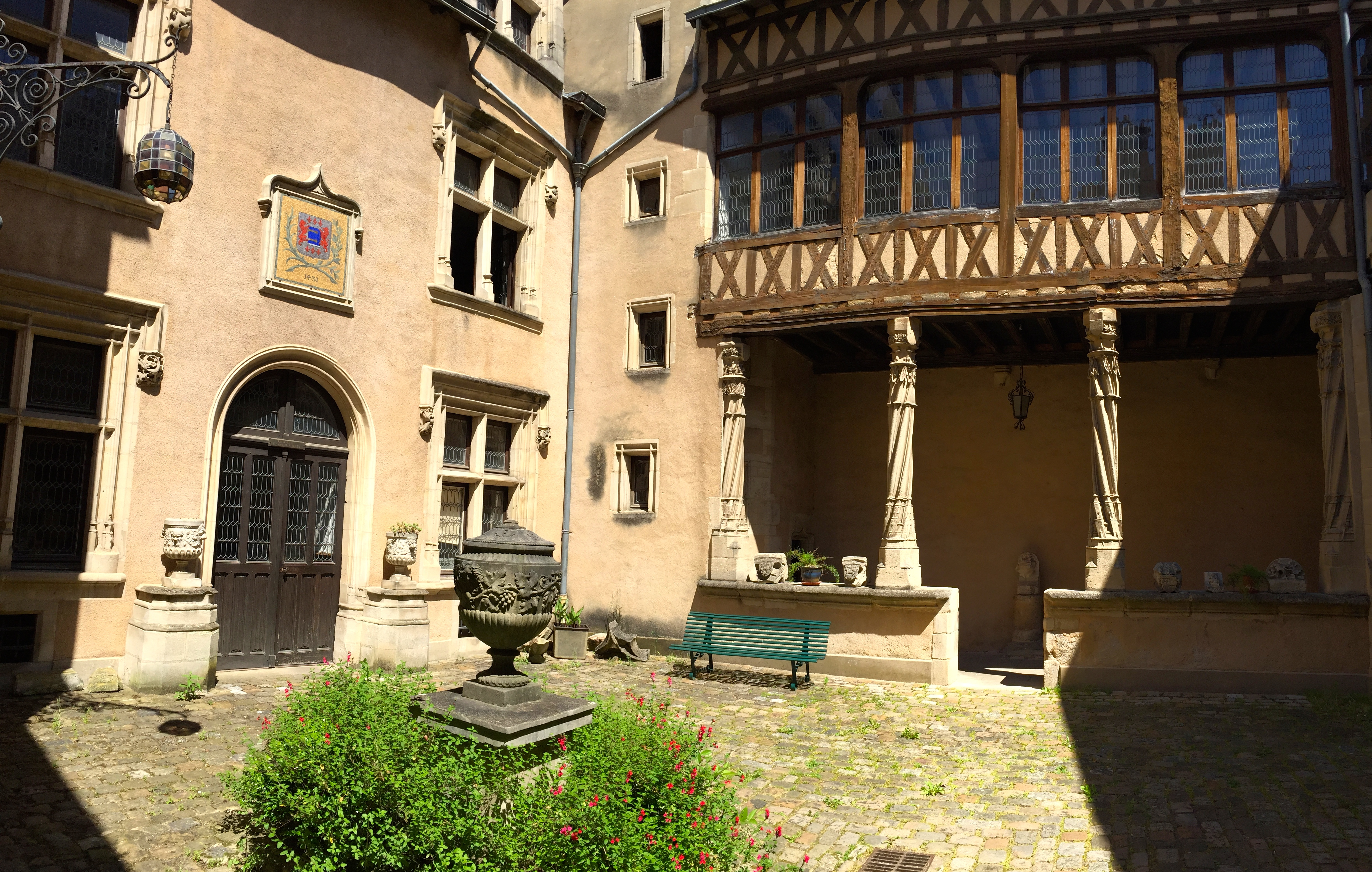 Cour intérieure de l'hôtel Fumé à Poitiers (Vienne, France)